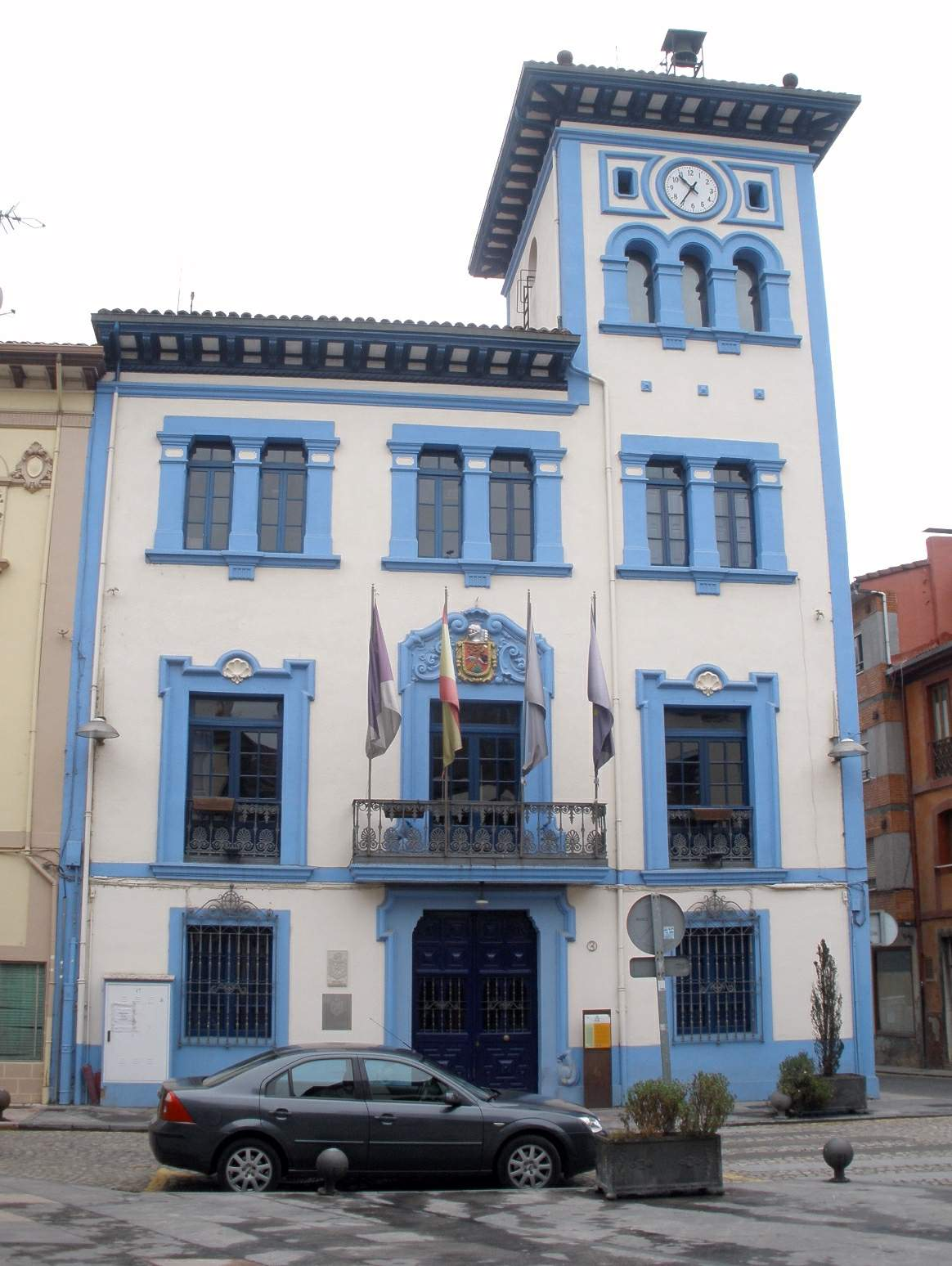 Ayuntamiento de Grado (Asturias)